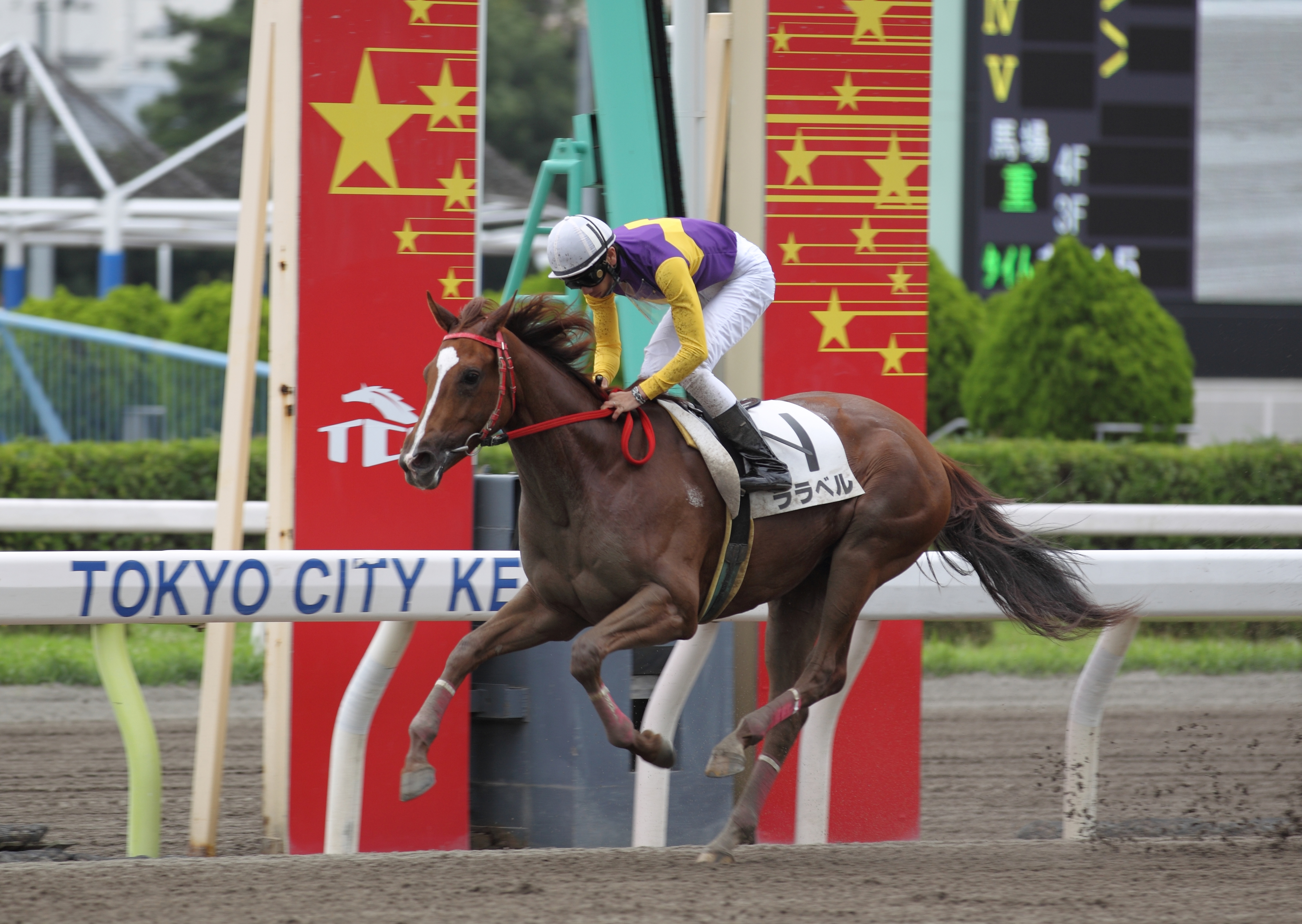 2014/7/10 大井競馬1Ｒ 2歳新馬：勝ち馬ララベル